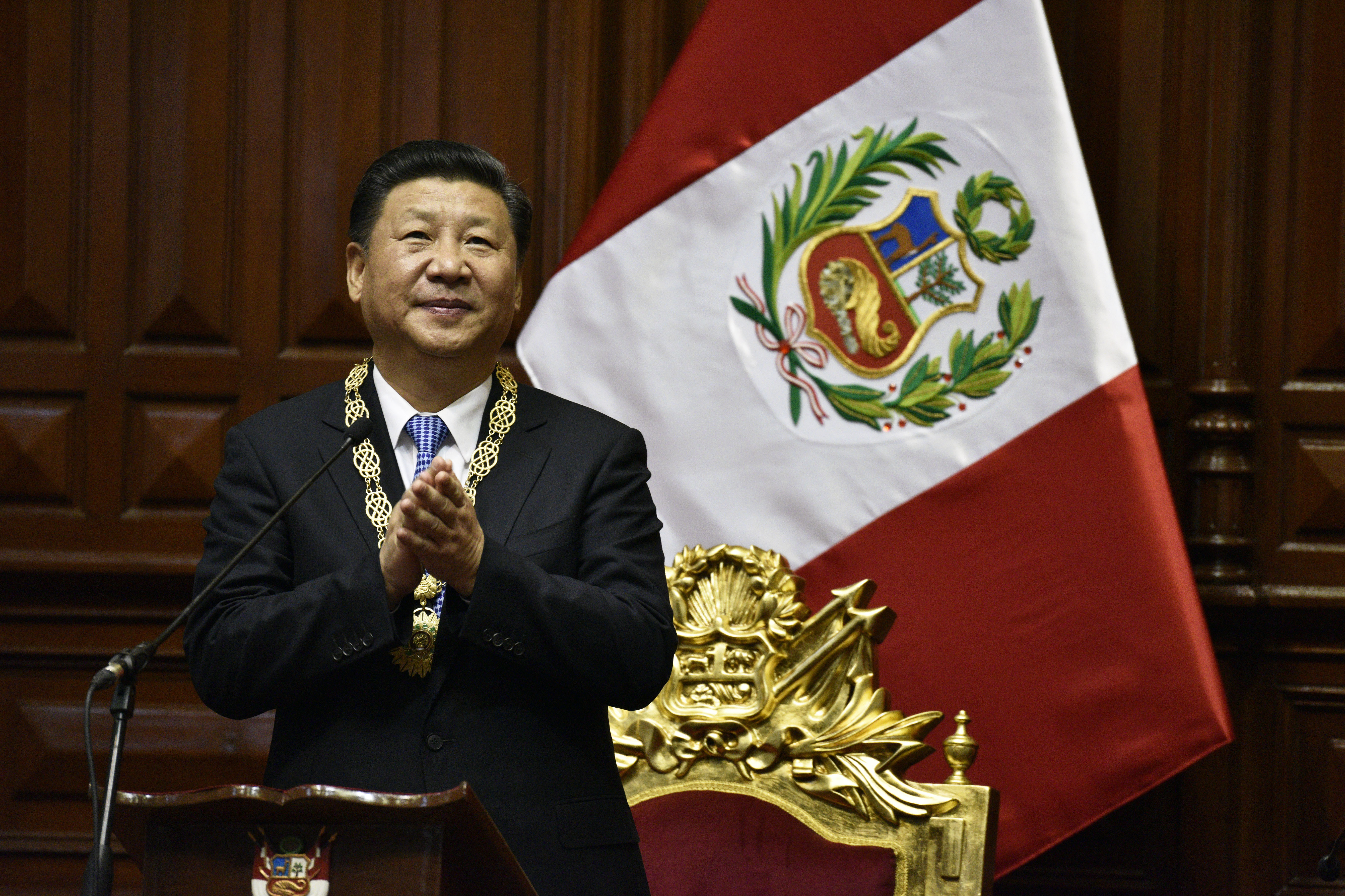 El Presidente de la República Popular China, Xi Jinping, recibió la Medalla de Honor en el grado de Gran Cruz, en el Congreso de la República.